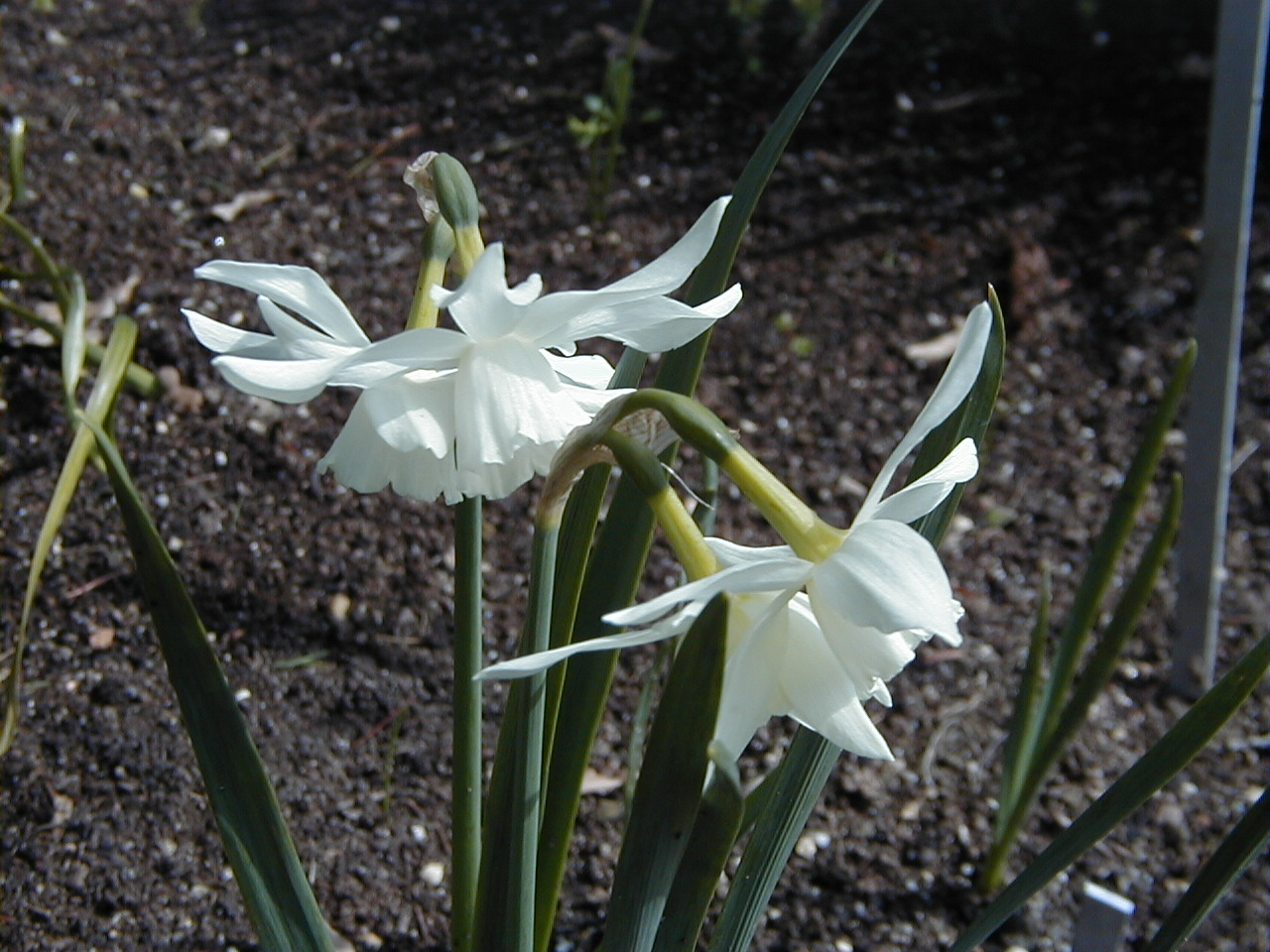 Narcissus 'Thalia', Div. 5. Real Jardín Botánico, Madrid